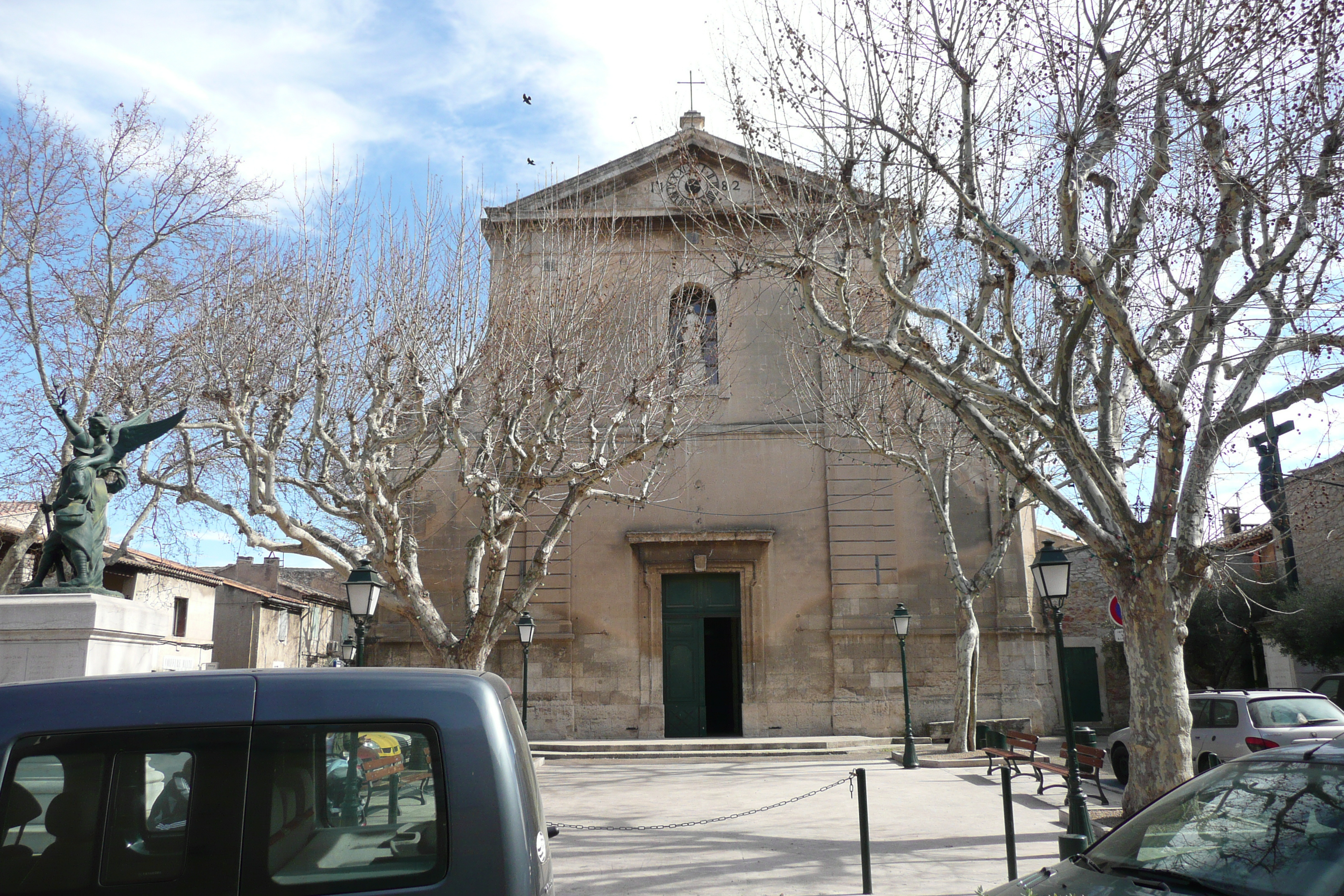 Église de Mouriès (Bouches-du-Rhône, France)